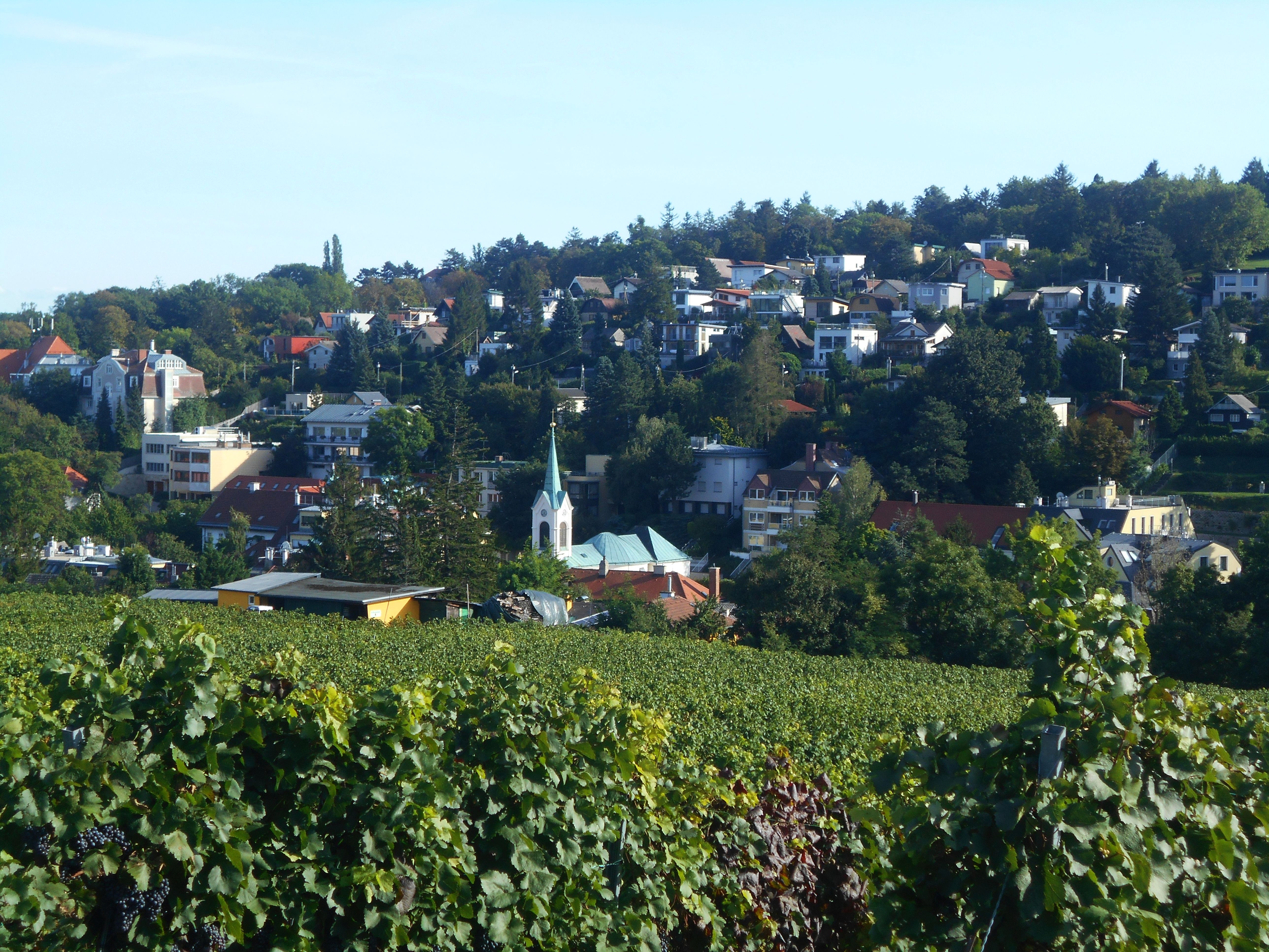 Neustift am Walde von der Mitterwurzergasse aus gesehen, im Vordergrund die Riede Hofstädten Diese Datei wurde im Rahmen von WikiDaheim 2019 in Österreich erstellt und hochgeladen.Sie wurde dem allgemeinen Themenbereich zugeordnet.